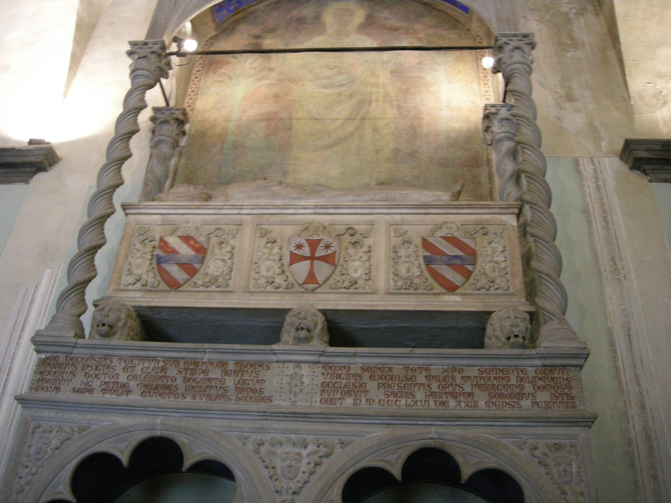 Santo spirito, cappella corsini, tomba di tommaso corsini